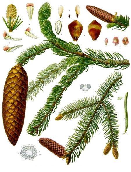 Gemeine Fichte. A Zweig mit männlicher und weiblicher Blüthe, natürl. Grösse; B weibliche Blüthe den jungen Fruchtzapfen bildend, desgl.; C Zweig mit reifem Fruchtzapfen, desgl.; 1 Blüthenkätzchen, desgl.; 2 männliche Blüthe von unten und von der Seite, desgl.; 3 Beutel, geöffnet, desgl.; 4 Pollenkorn, desgl.; 5 Fruchtblätter des blühenden Kätzchens, von der inneren und äusseren Seite gesehen, desgl.; 5a Bractee der weiblichen Blüthe, desgl.; 6 Fruchtblatt mit den beiden Samen, von verschiedenen Seiten; 7 Samenkorn mit und ohne Flügel, natürl. Grösse; 8 Same im Längsschnitt, vergrössert; 9 Nadel mit Querschnitt, desgl.; 10 Harzgang a aus der Rinde von Picea excelsa, dessen umliegende Zellen b mit halbflüssigem Harze und die Rindenzellen c noch mit geringen Mengen von Stärkemehl angefüllt sind. (Nach Dippel.)